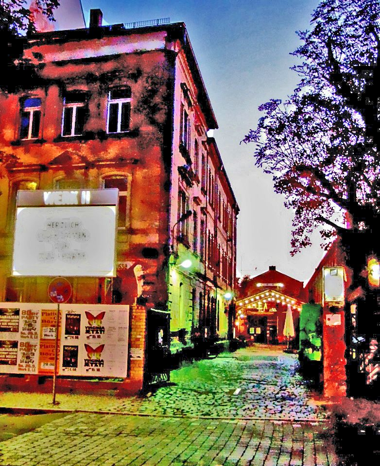 Das soziokulturelle Zentrum Werk II in Leipzig-Connewitz, Kochstraße/Connewitzer Kreuz